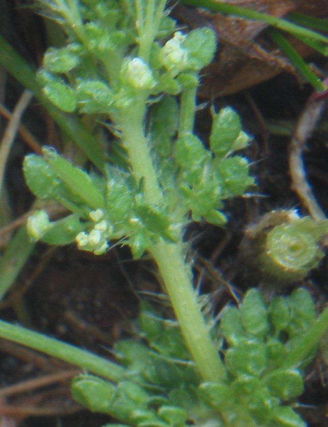 Bloeiwijze van de kleine brandnetel (Urtica urens). Eigen werk, GFDL.